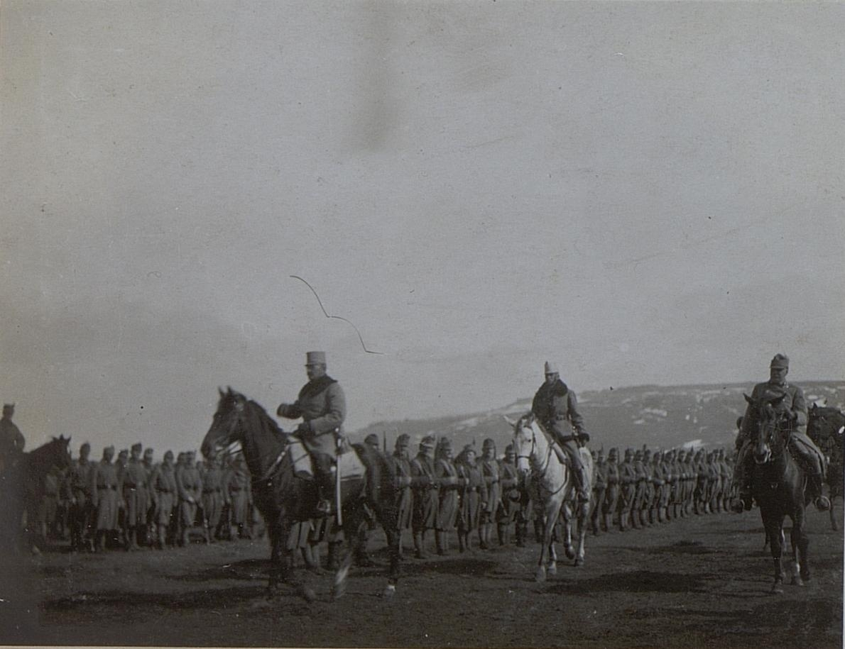 Armee Kommdt. Pflanzer Baltin inspiziert d.IR.54.Alt.Zucska.